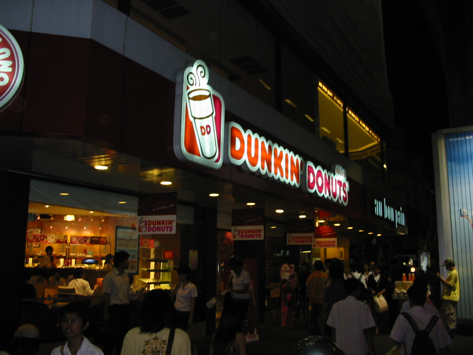 Dunkin' Donut at Siam Square